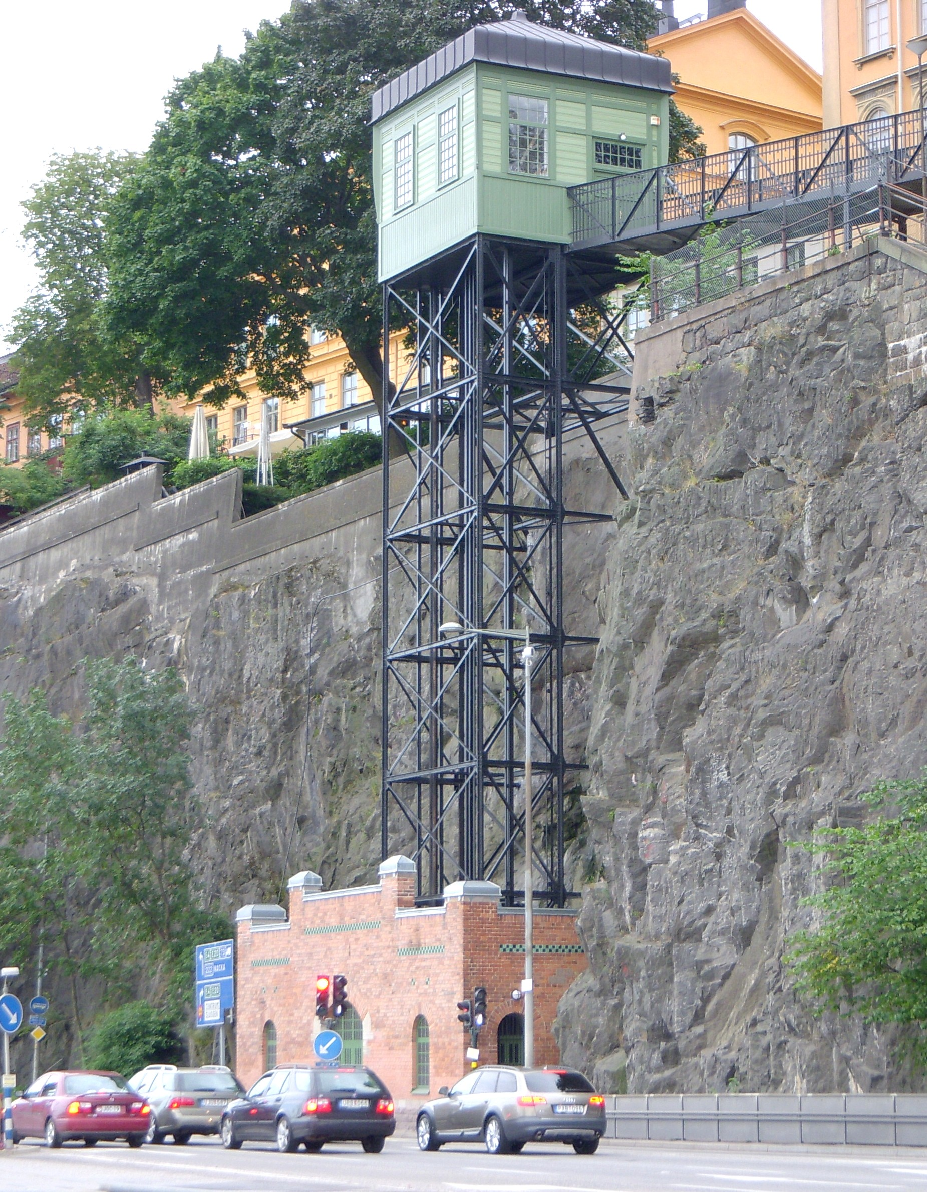 Stadsgårdshissen sedd från Stadsgården